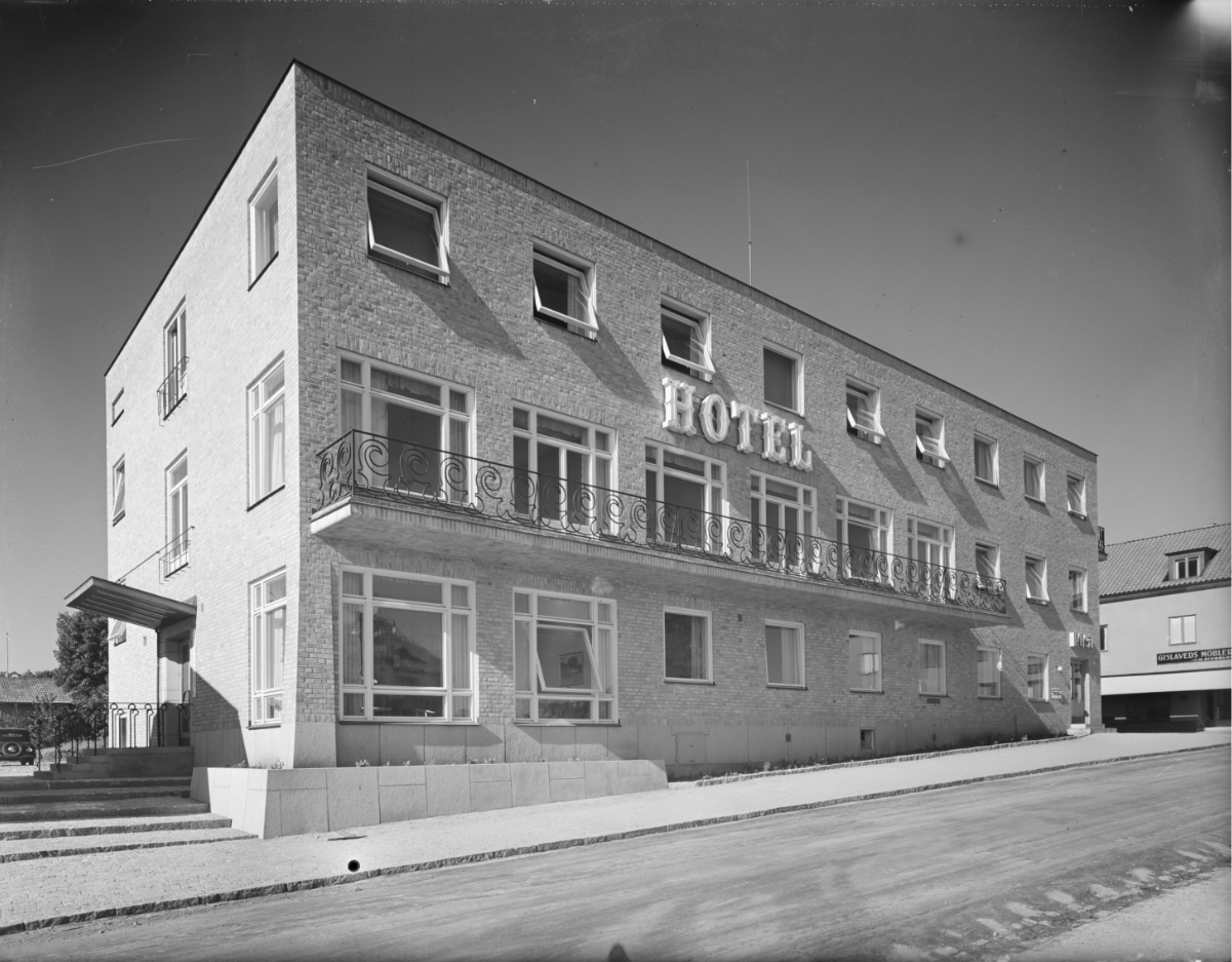 Hotel Nissastigen, Gislaved. Invigt 1946